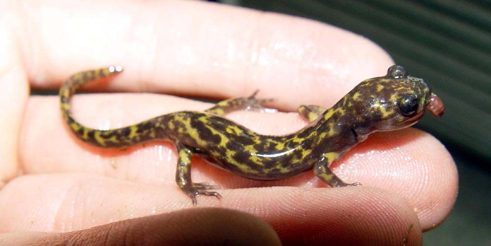 Paradactylodon gorganensis